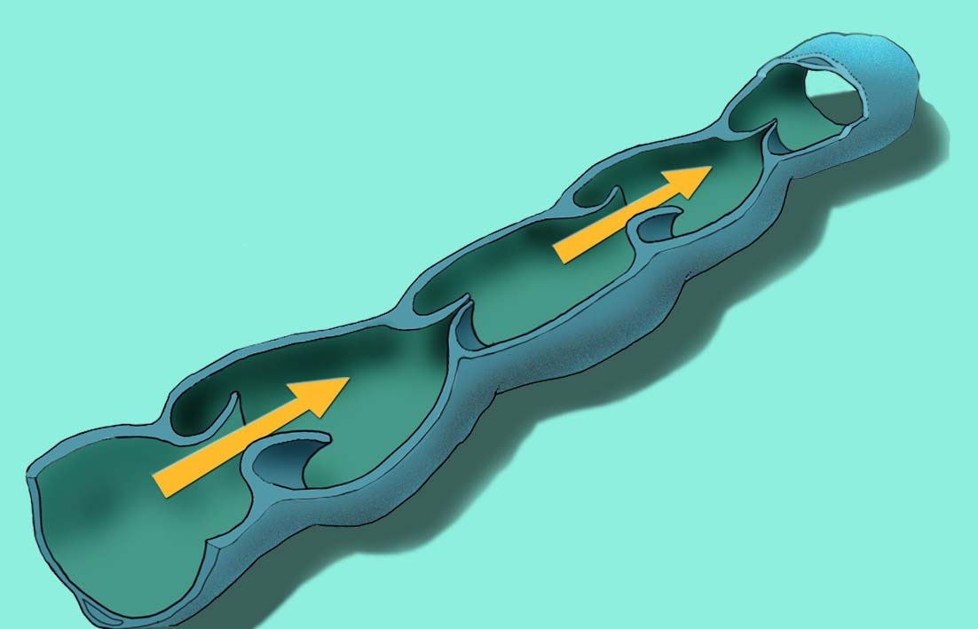 Les flèches jaunes indiquent le sens de circulation de la lymphe, propulsée par la contraction de chaque cellule (dite lymphangion) quand la valvule amont de ferme sous l'effet de la pression interne de la lymphe accumulée dans une cellule. Comme la paroi des vaisseaux sanguins, cette paroi n'est pas étanche et les globules blancs peuvent la franchir.